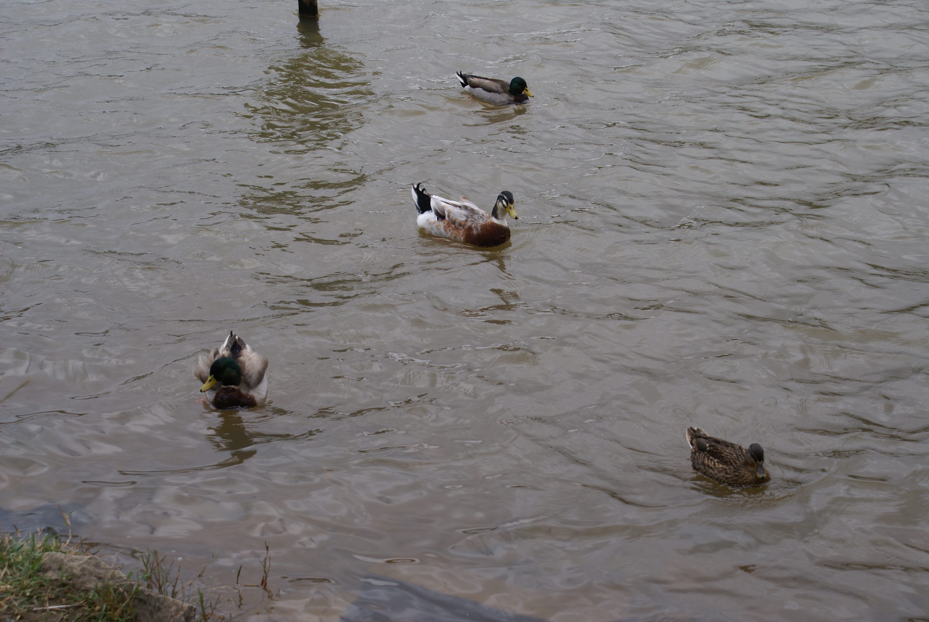 Ducks in lake of Carmo's Park, São Paulo City, Brazil - Patos no lago do Parque do Carmo, São Paulo, Brasil.